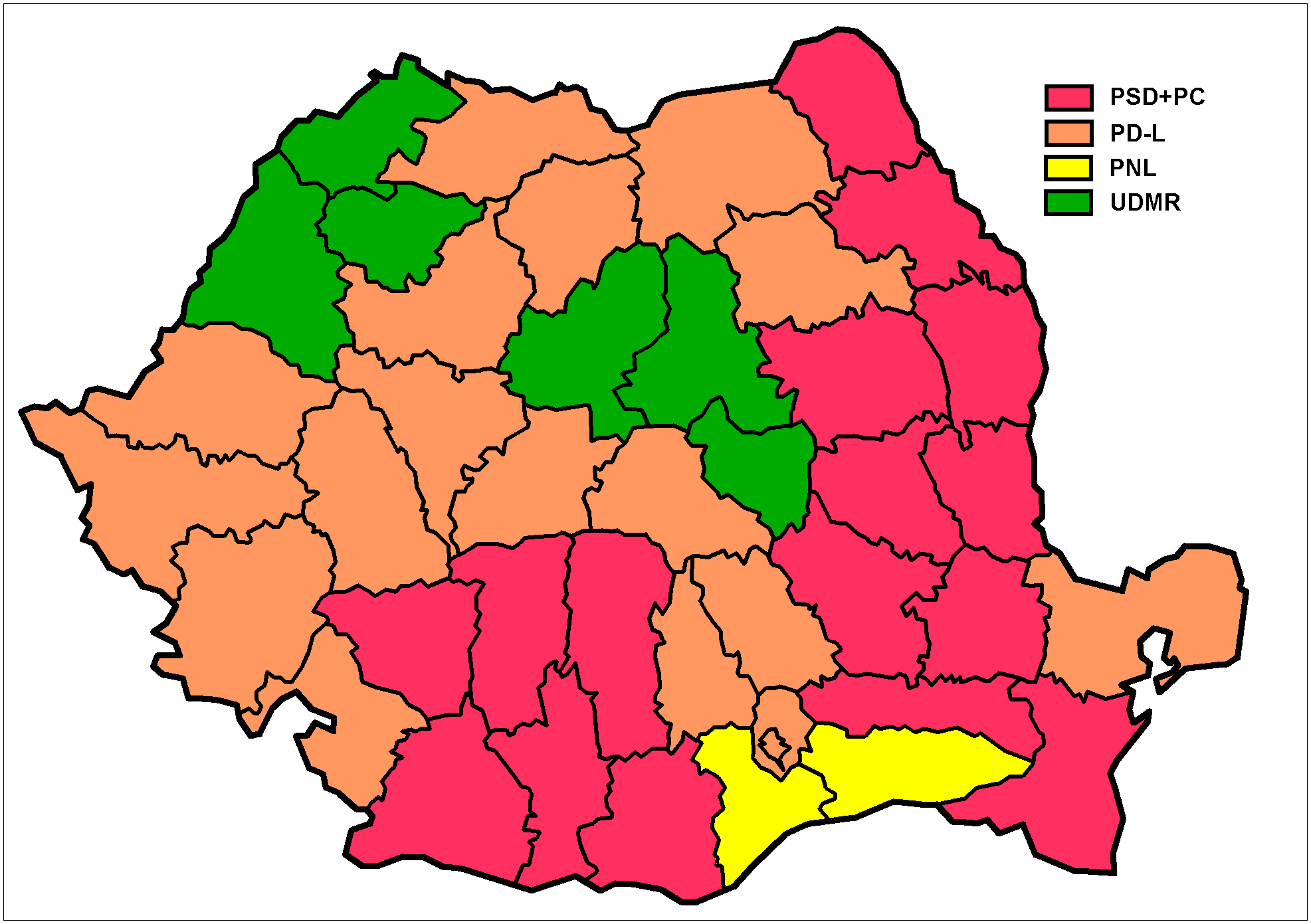 Parlamentswahlen Rumänien 2008, meisterrungene Stimmen nach Kreisen, Abgeordnetenkammer